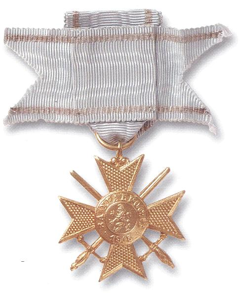 Войнишки знак на ордена „За Храброст“ I степен, емисия 1915 г. (аверс)